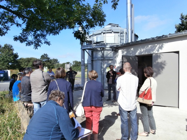 Visite de la chaufferie de Bouvron lors du cycle de visite 2016